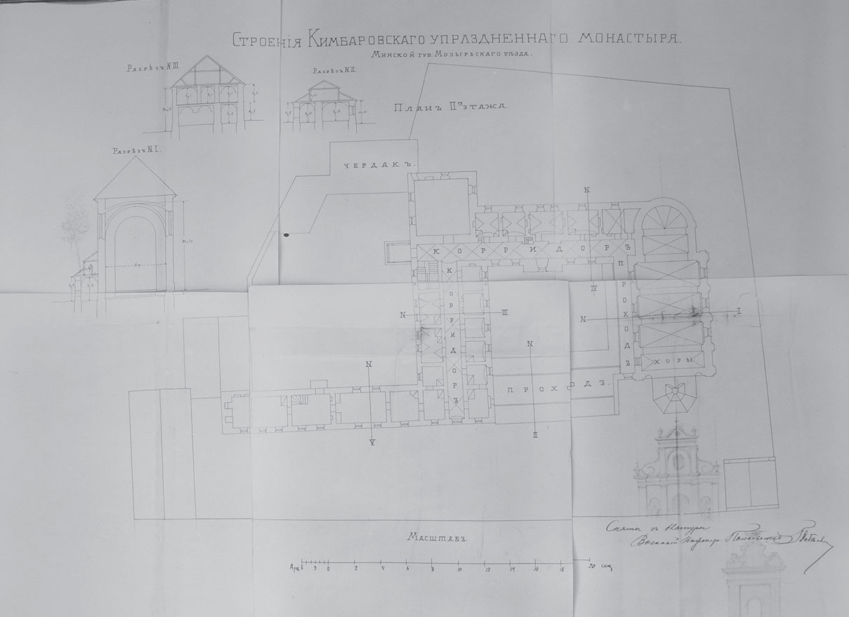 Беларуская (тарашкевіца): Мазыр (Mazyr), Кімбараўка (Kimbaraŭka). Касьцёл і кляштар цыстэрыянак